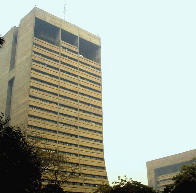 NDMC Building.